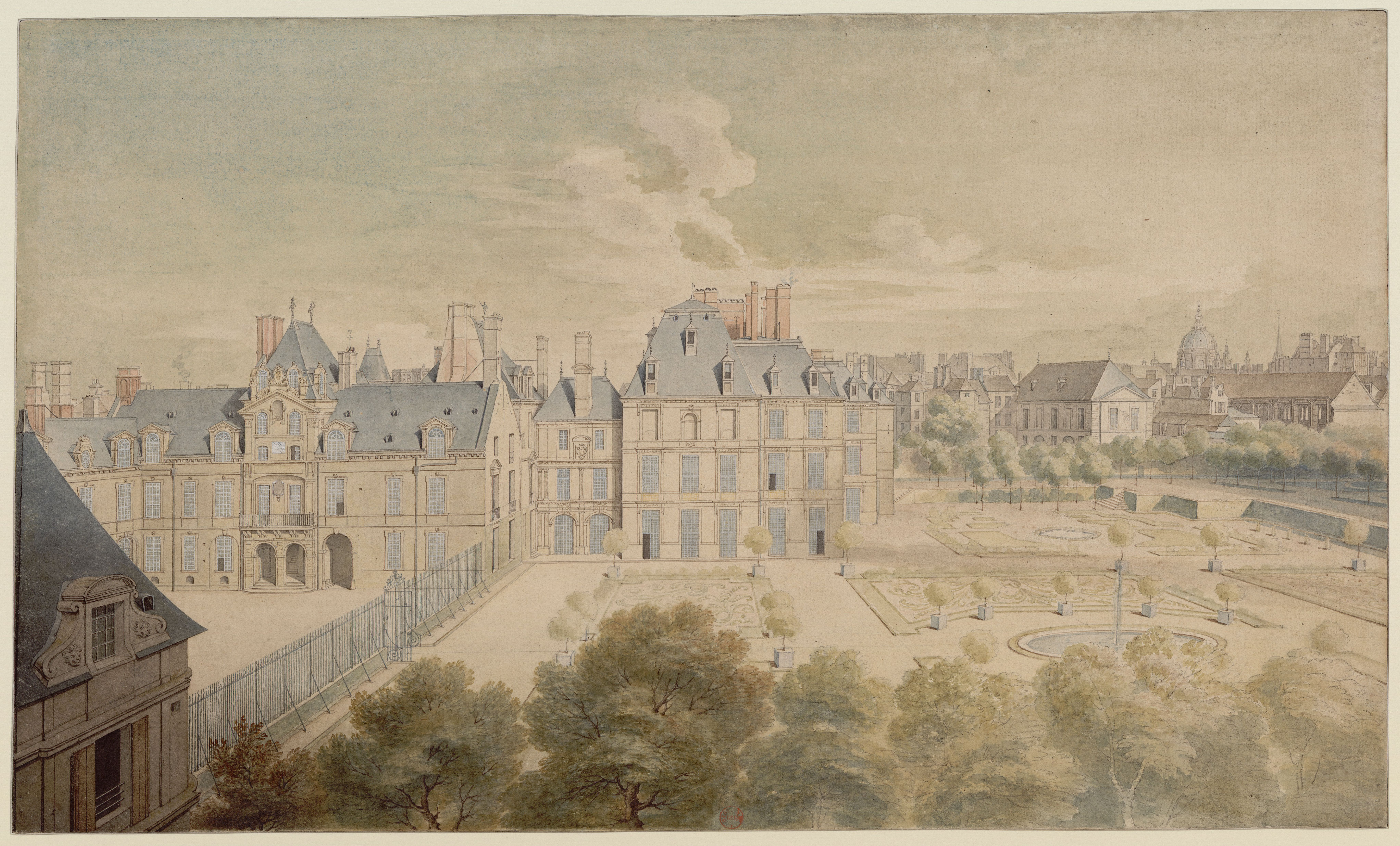 Vue de la cour intérieure et de l'escalier de l'Hôtel de Condé (Paris - XVIIIe siècle)